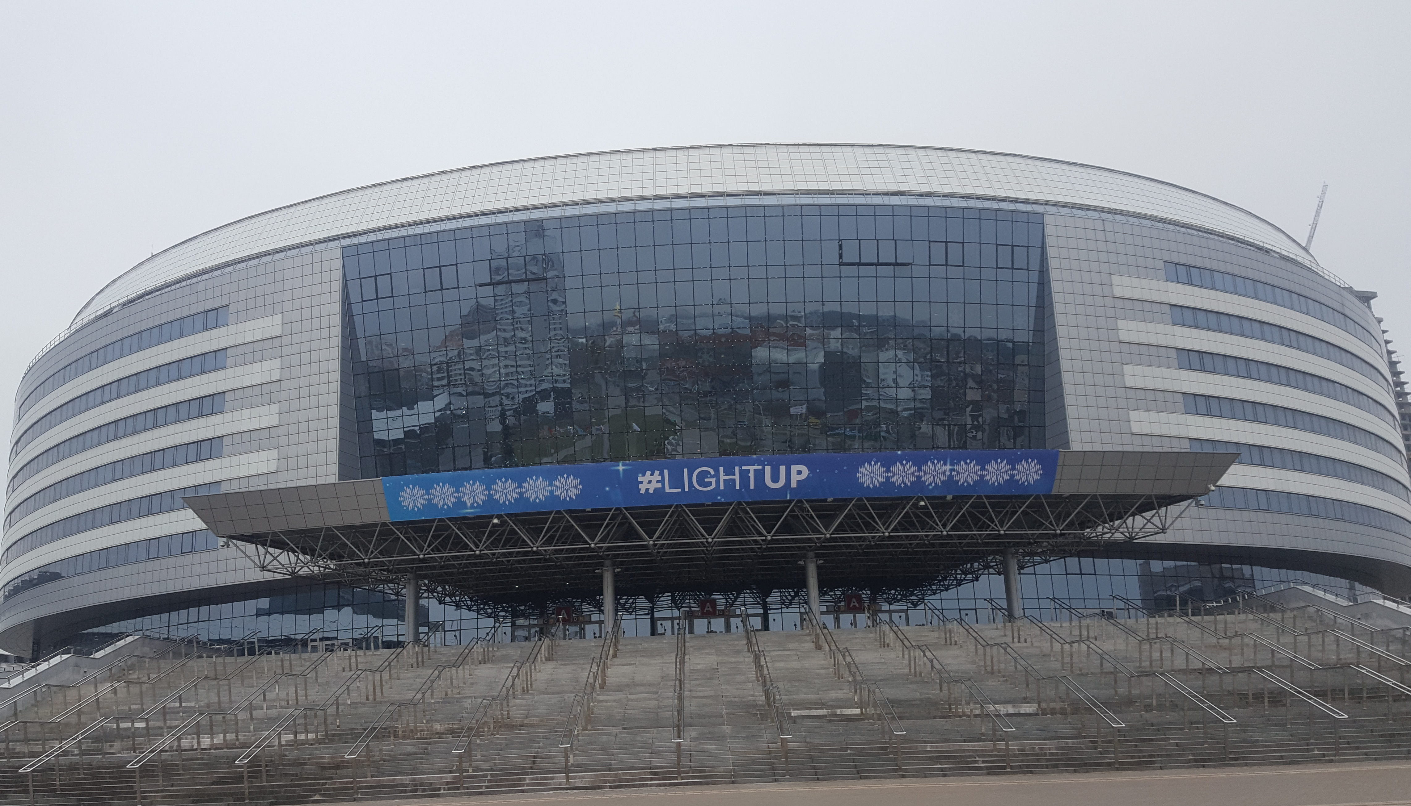 Hala Mińsk Arena przed 16. Konkursem Piosenki Eurowizji dla Dzieci w Mińsku, 24 listopada 2018.